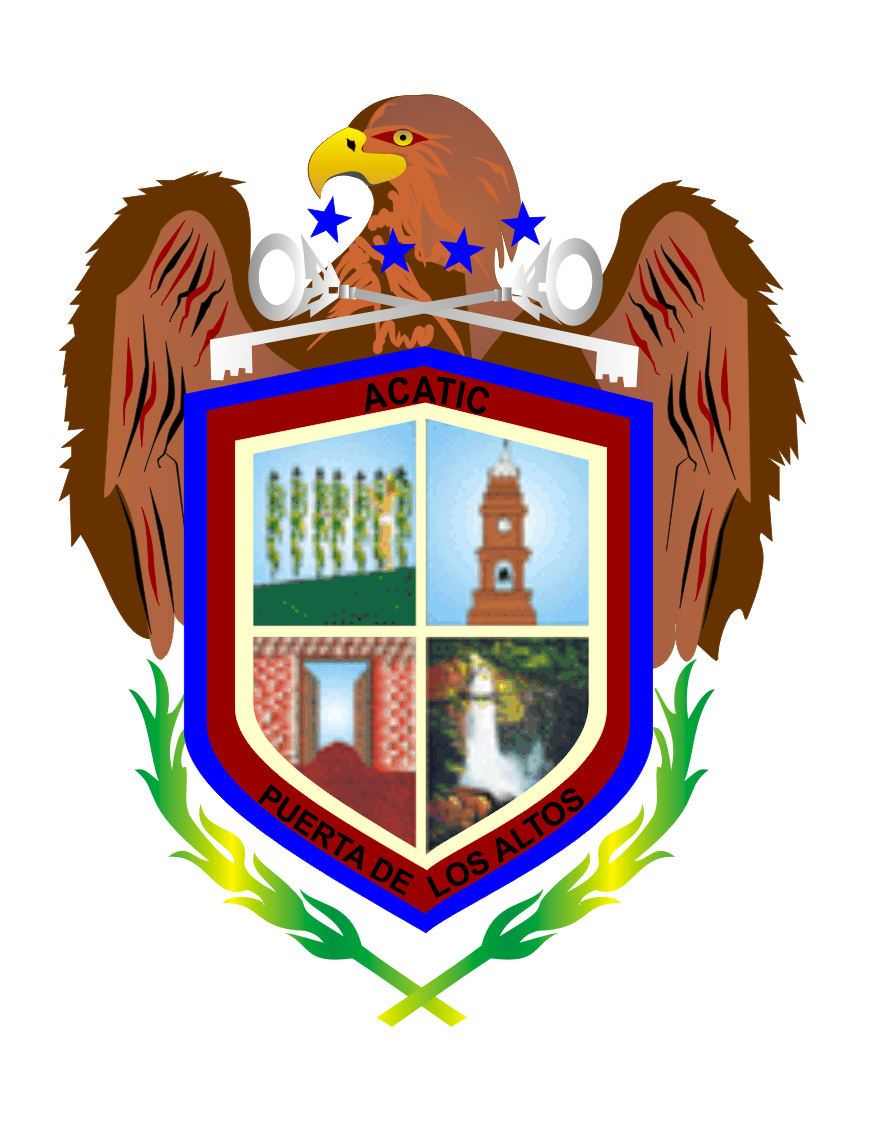 Blasón del municipio de Acatic, Jalisco, México.